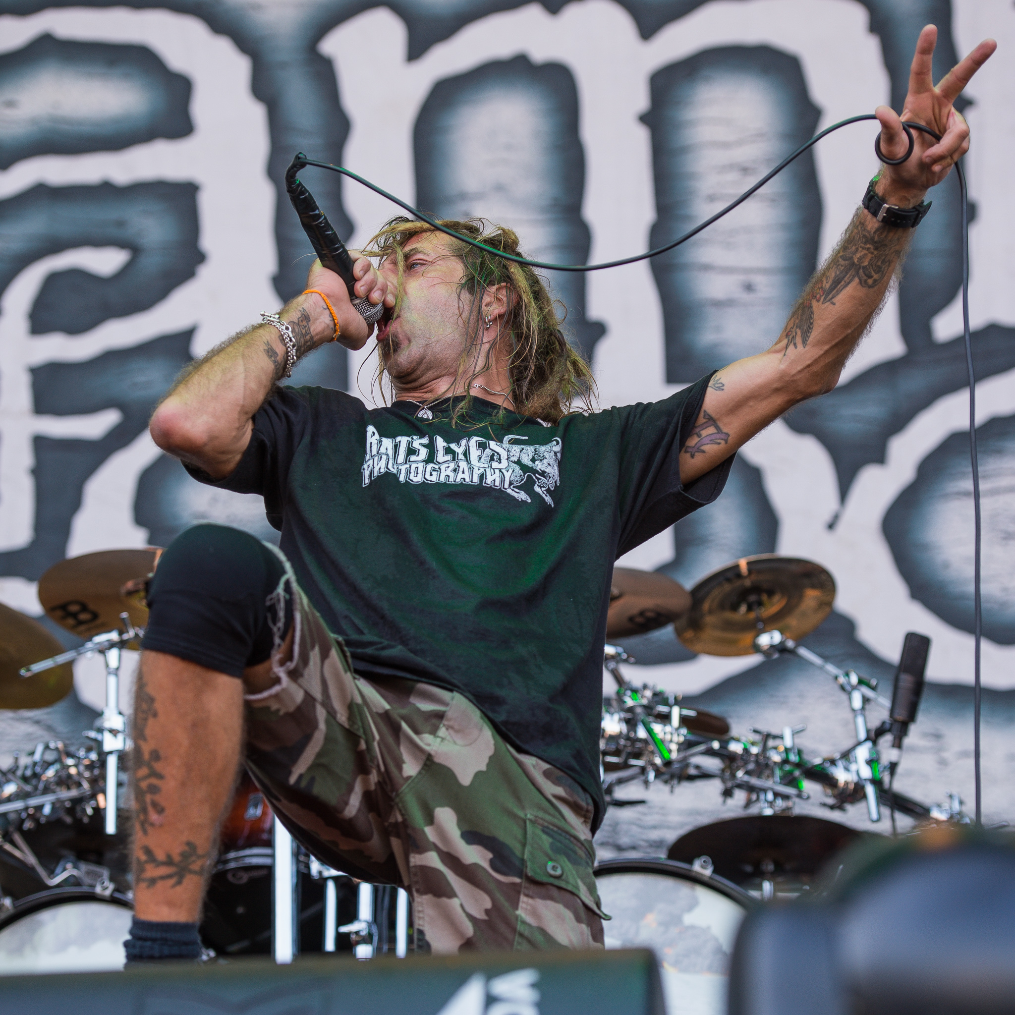 ARGO-Konzerte,Beck's Park Stage,Festival,Konzert,Lamb of God,Livekonzert,Livemusik,Musik,Randy Blythe,RiP,Rock im Park 2015